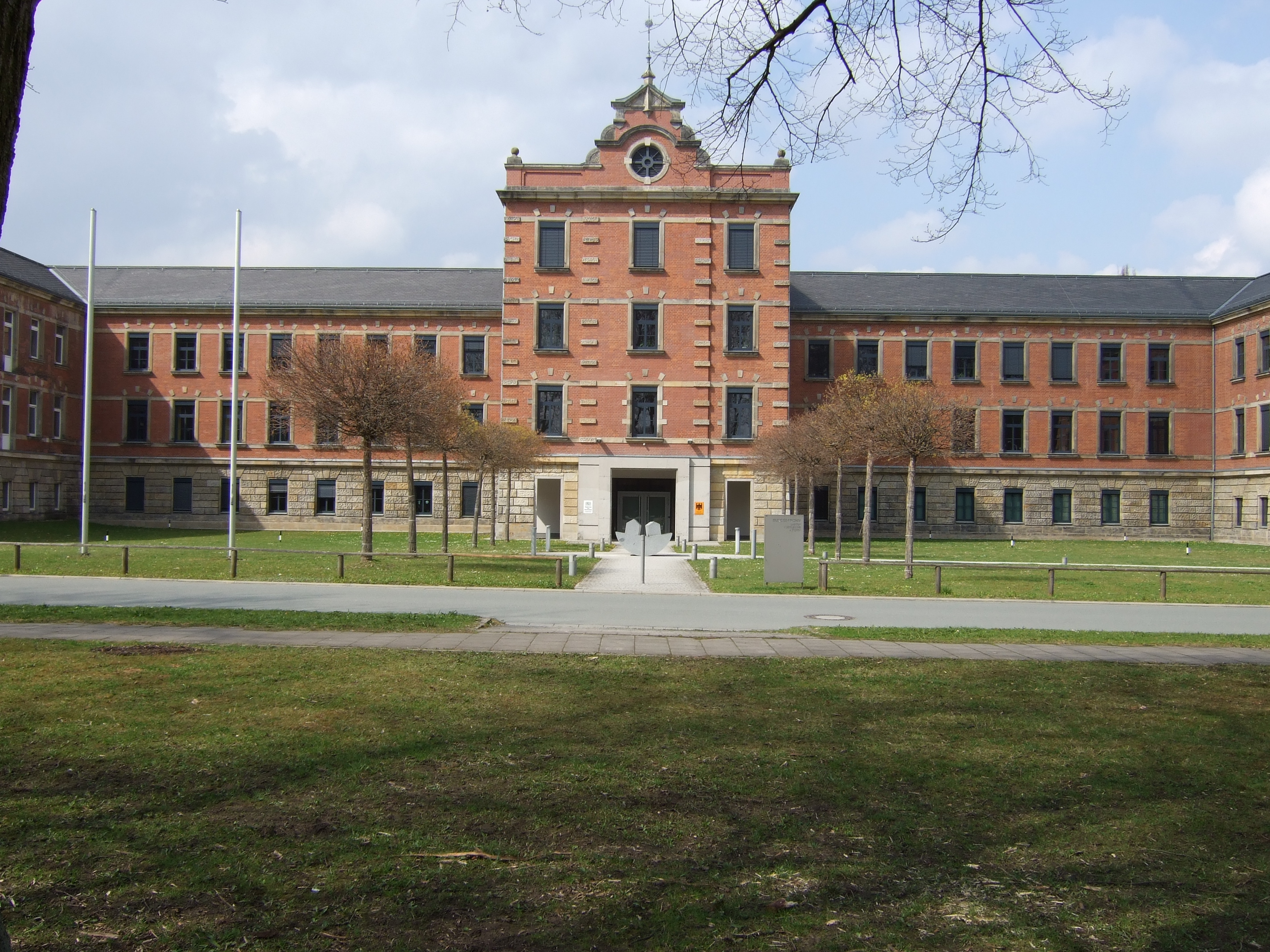 Altes Städtisches Krankenhaus Bayreuth